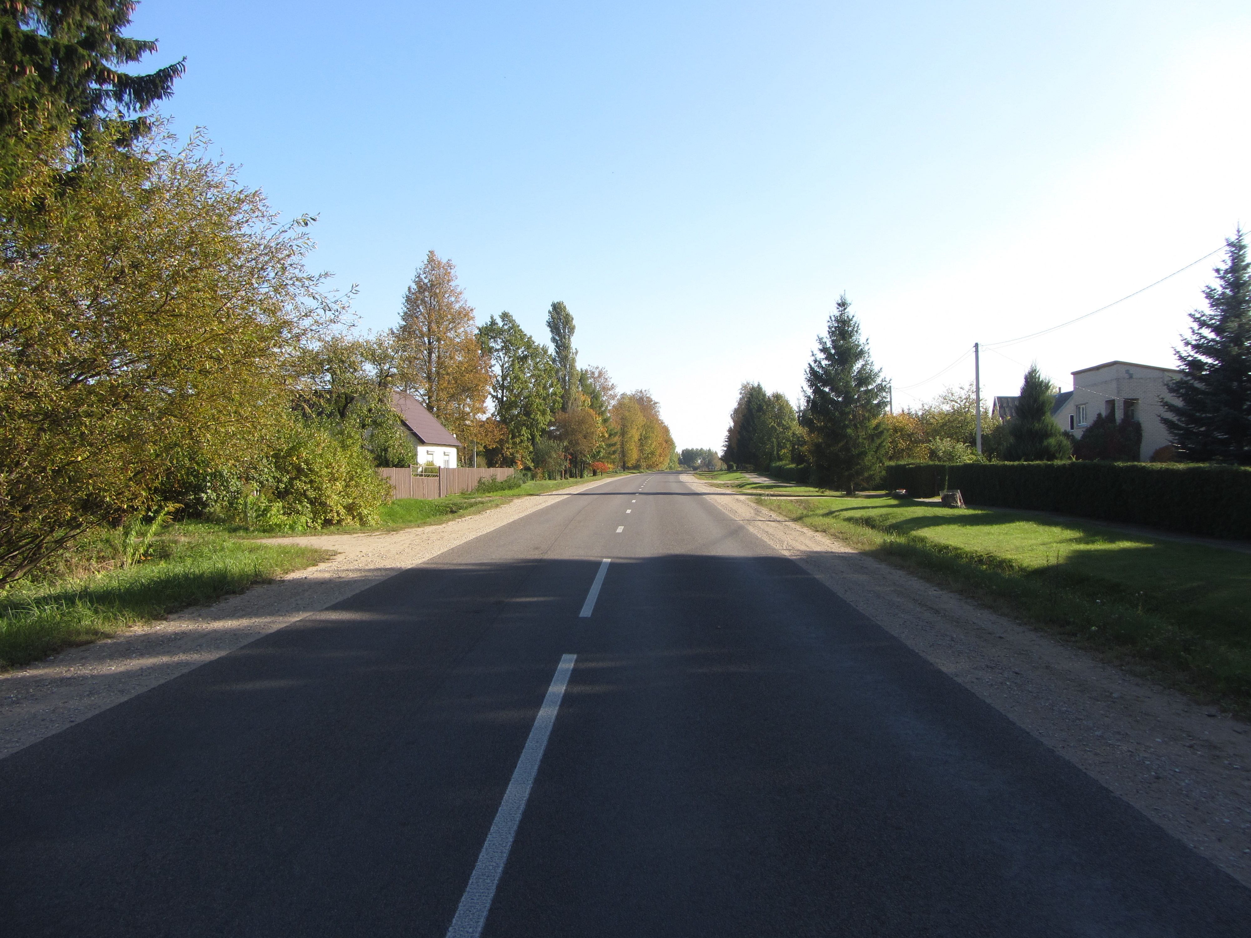 Pandėlys, Lithuania